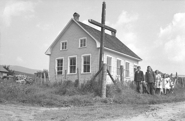 École de rang et élèves à Saint-Fidèle, comté de Charlevoix